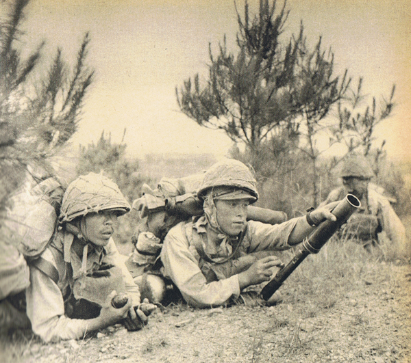 浙贛作戦で国府軍と交戦する第13軍の兵士。於浙江省金華市湯渓、昭和17年5月30日。 Soldiers of JIA 13th Army during the Zhejiang-Jiangxi operation, 30 May 1942. At Jīnhuá, Zhèjiāng Province, China.